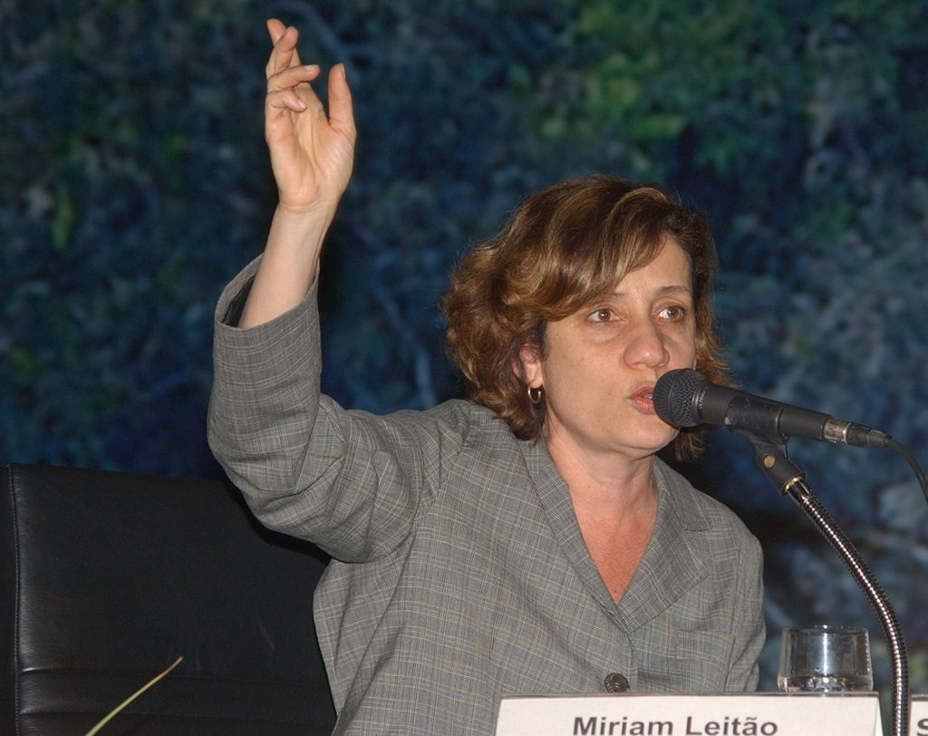 Brazilian journalist (Rede Globo) Miriam Leitão